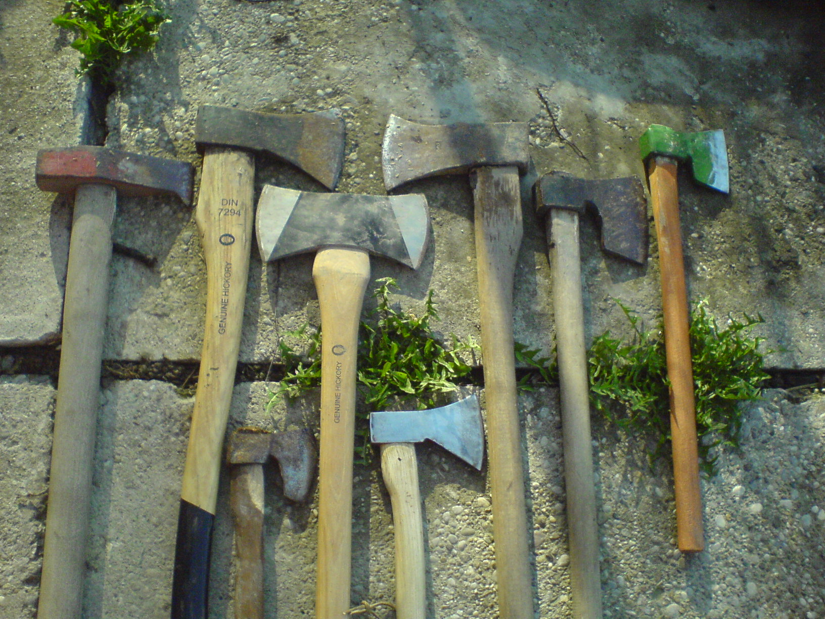 Nekoliko tradicionalnih oblika sječiva sjekira